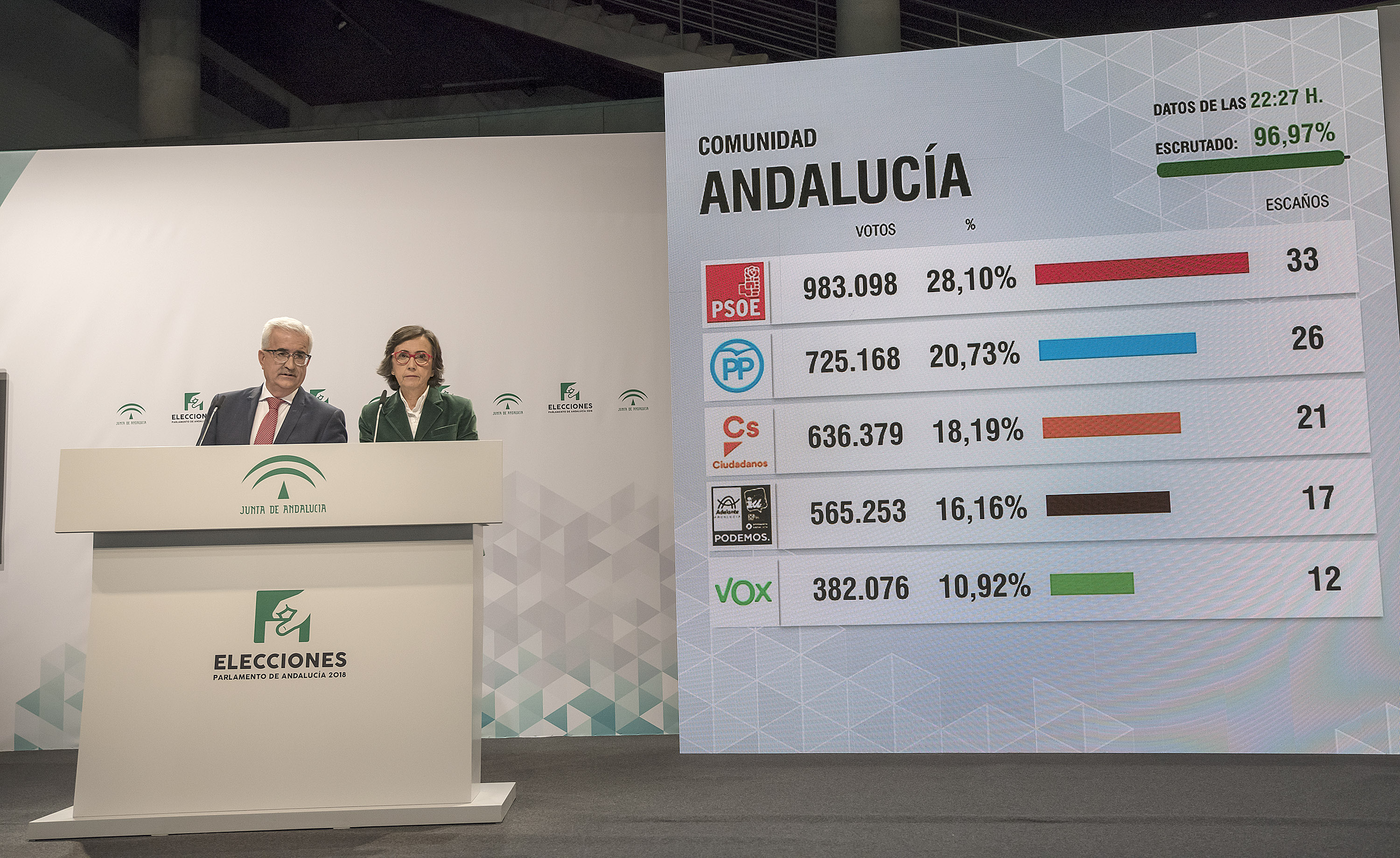 Jornada electoral. Elecciones al Parlamento de Andalucía. El Vicepresidente y Consejero de la Presidencia, Manuel Jiménez Barrios y La Consejera de Justicia y Gobernación, Rosa Aguilar en la rueda de prensa donde informó de los datos del escrutinio de las elecciones.02/12/2018.